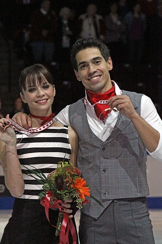 Анна Каппеллини и Лука Ланотте на подиуме 2011 Skate Canada International